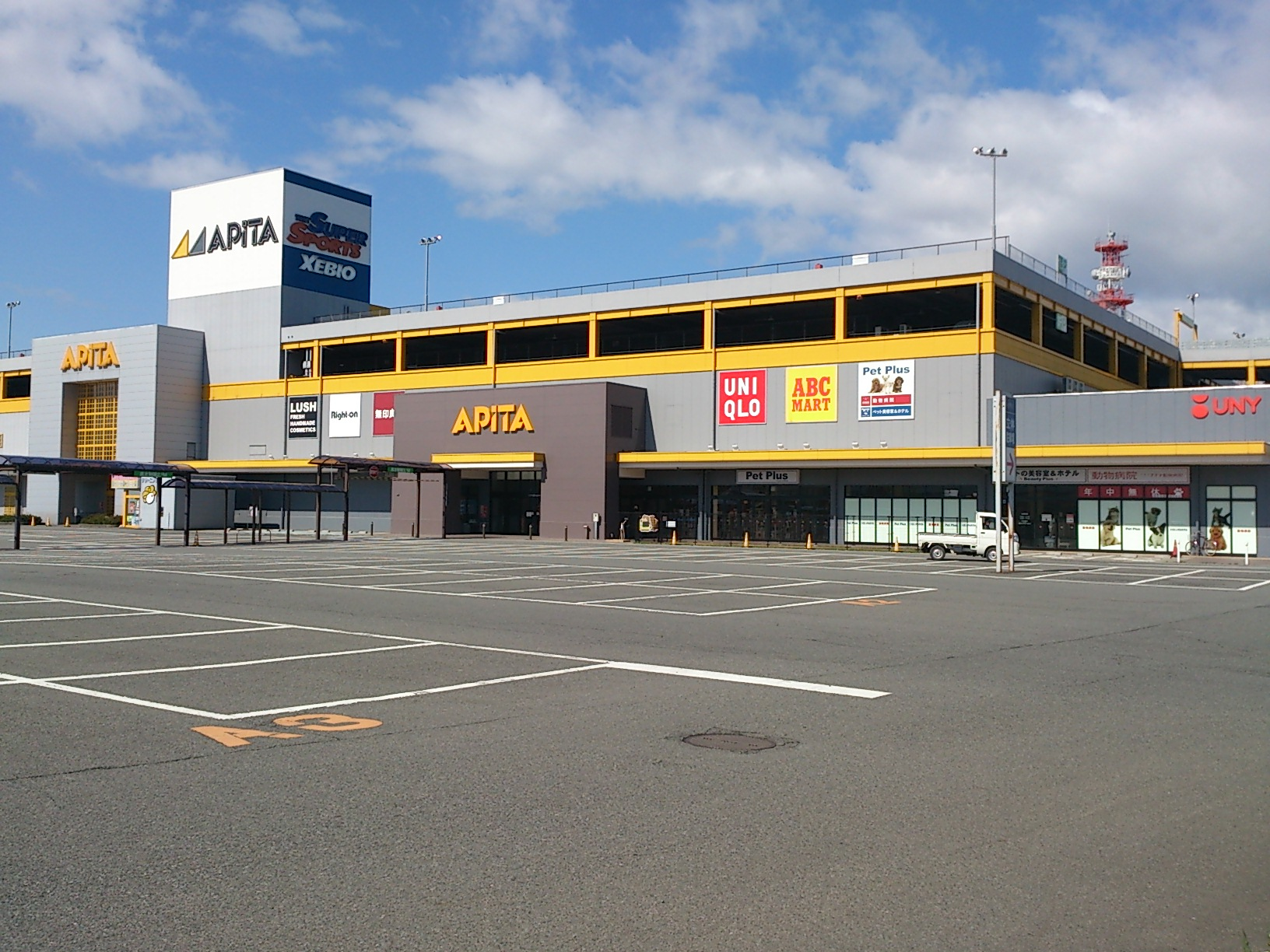 北側のゼビオ館